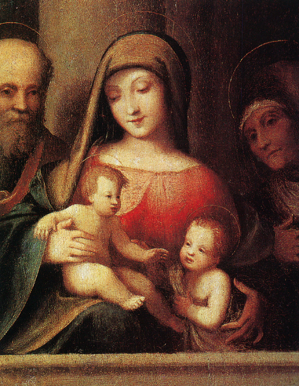 Madonna Pavia